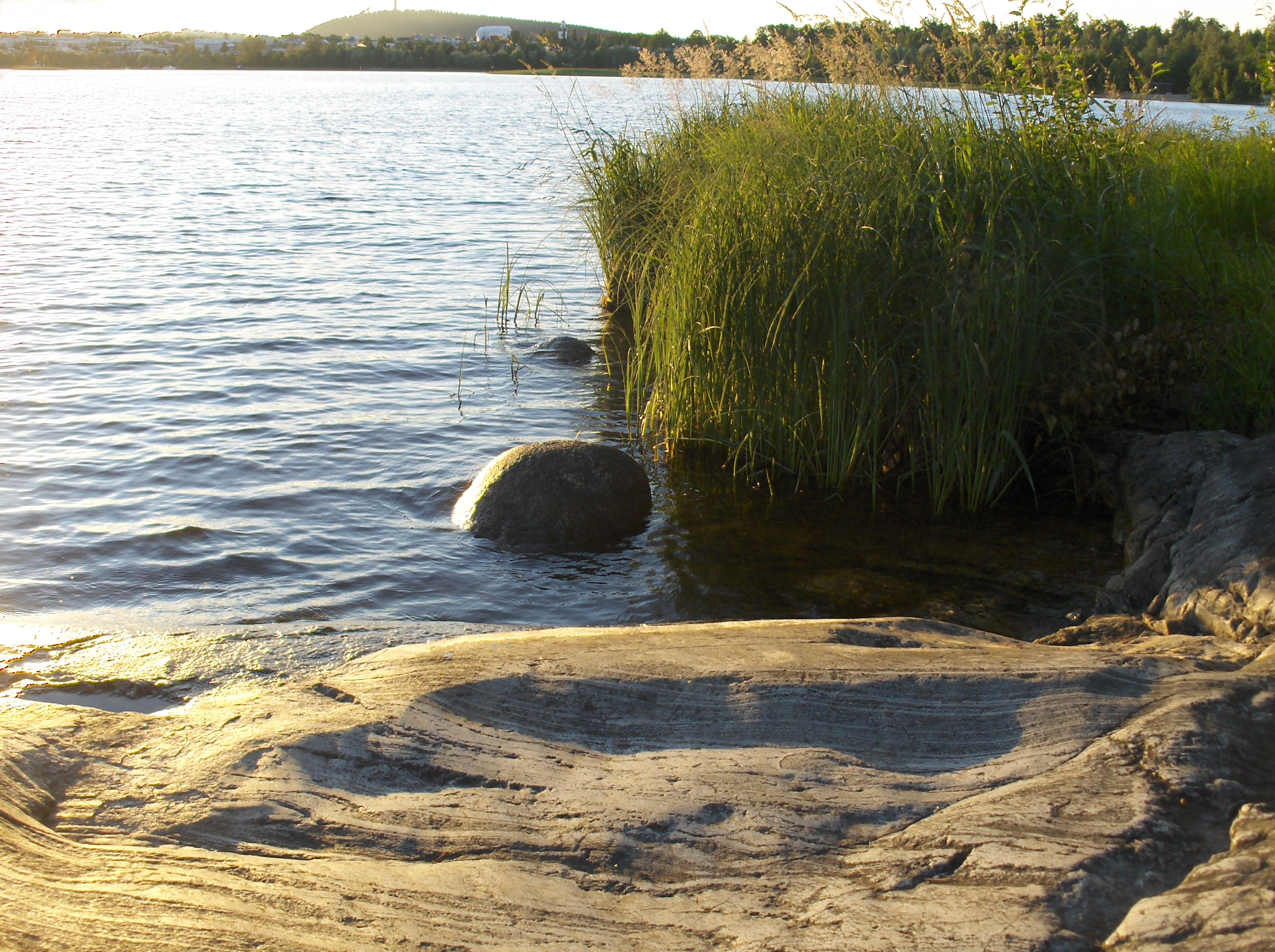 Näkymä Väinölänniemeltä. Taustalla muun muassa Puijon mäki ja torni.